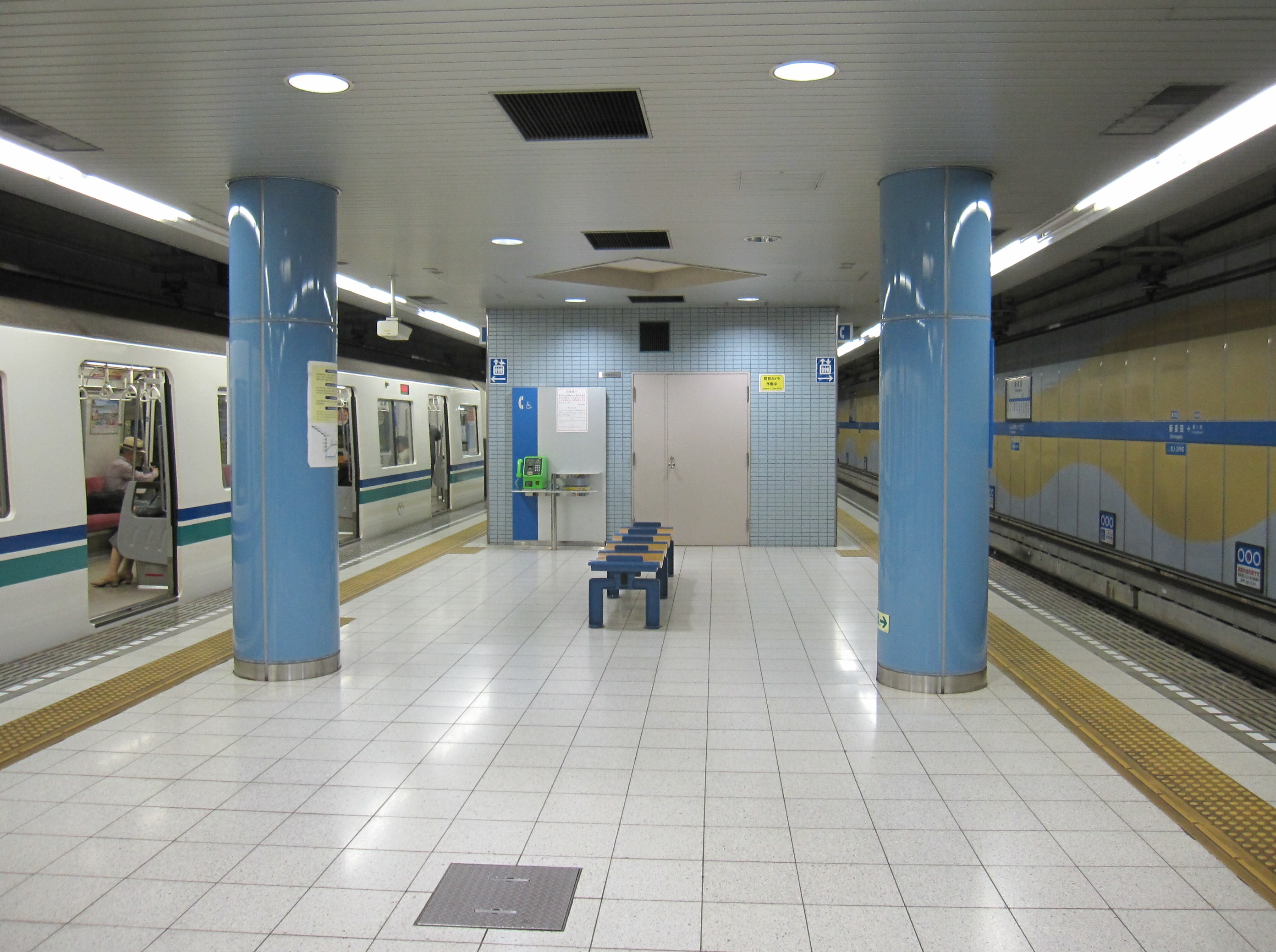 神戸市営地下鉄海岸線新長田駅ホーム。